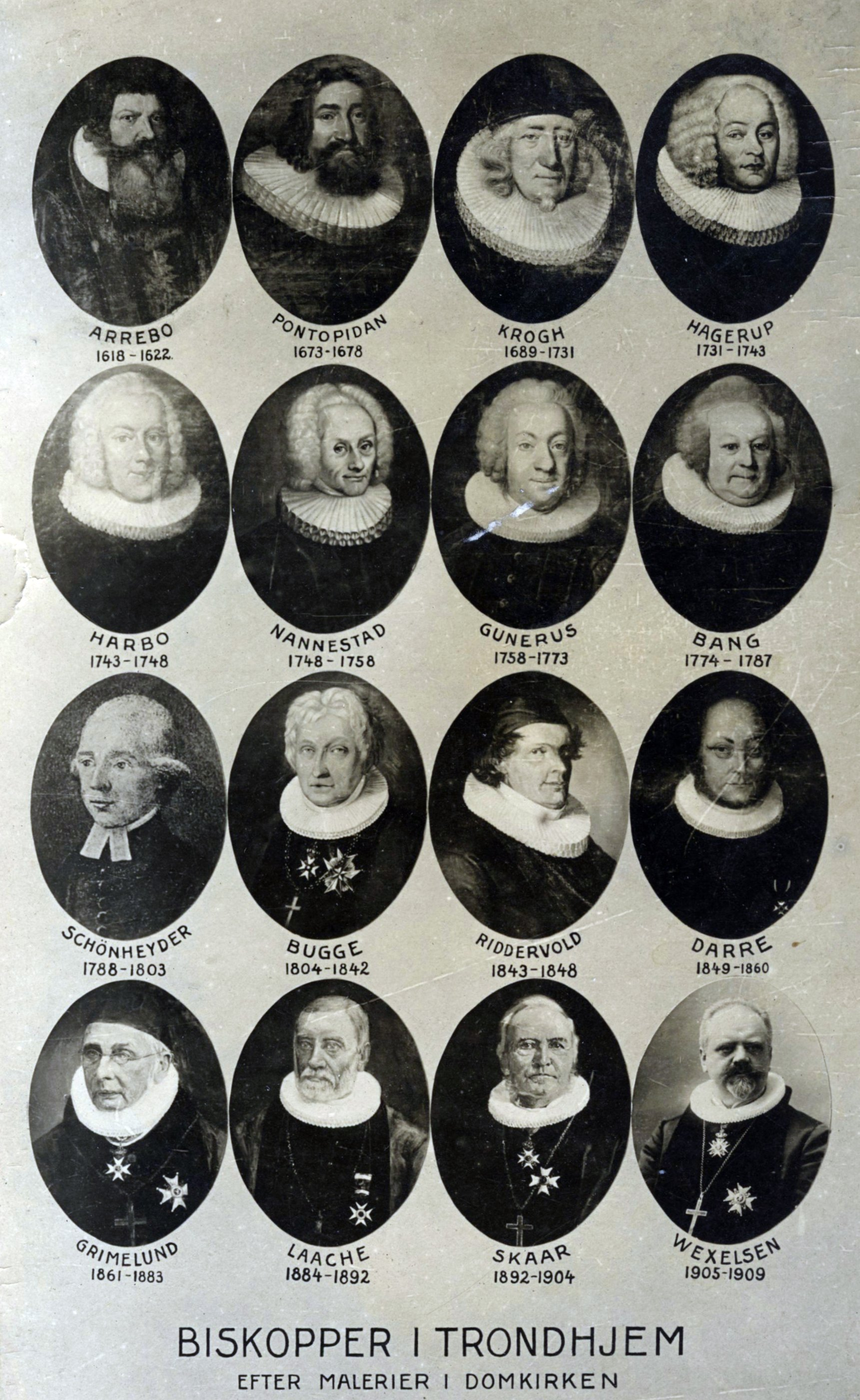 Fotograf: Erik Olsen (1835 - 1920). Format: Fotopositiv. År: Ukjent (før 1920). Anders Christenssøn Arrebo, født 1587, død 1637, dansk dikter. Kilde: Store Norske Leksikon , artikkelforfatter Mogens Brøndsted. Erik Pontoppidan – biskop, født 1616, død 1678, Kilde: Store Norske Leksikon , artikkelforfatter redaksjonen. Peder Krog, født 1654, død 1731, Kilde: Store Norske Leksikon , artikkelforfatter redaksjonen. Eiler Hagerup, født 1685, død 1743, Kilde: Store Norske Leksikon , artikkelforfatter redaksjonen. Ludvig Harboe, født 1709, død 1783, Kilde: Store Norske Leksikon , artikkelforfatter redaksjonen. Frederik Nannestad, født 1693, død 1774, Kilde: , artikkelforfatter redaksjonen. Marcus Frederik Bang, født 1711, død 1789, Kilde: Store Norske Leksikon , artikkelforfatter redaksjonen. Johan Christian Schønheyder – biskop, født 1742, død 1803, Kilde: Store Norske Leksikon , artikkelforfatter Jon Gunnar Arntzen. Peter Olivarius Bugge, født 1764, død 1849, Kilde: Store Norske Leksikon , artikkelforfatter redaksjonen. Hans Riddervold, født 1795, død 1876, Kilde: Store Norske Leksikon , artikkelforfatter Magnus A. Mardal. Hans Jørgen Darre, født 1803, død 1874, Kilde: Store Norske Leksikon , artikkelforfatter redaksjonen. Andreas Grimelund, født 1812, død 1896, Kilde: Store Norske Leksikon , artikkelforfatter redaksjonen. Niels Jacob Jensen Laache, født 1831, død 1892 Kilde: Store Norske Leksikon , artikkelforfatter redaksjonen. Johannes Nilsson Skaar, født 1828, død 1904, Kilde: Store Norske Leksikon , artikkelforfatter redaksjonen. Vilhelm Andreas Wexelsen, født 1849, død 1909, Kilde: Store Norske Leksikon , artikkelforfatter redaksjonen.